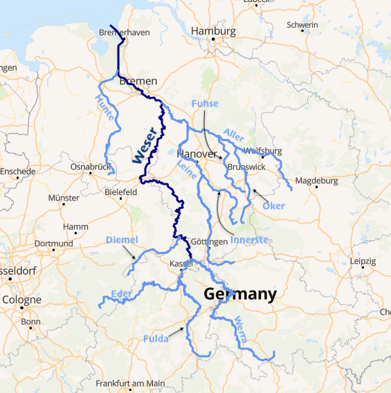 carte réalisée sur umap This map may be incomplete, and may contain errors. Don't rely solely on it for navigation.